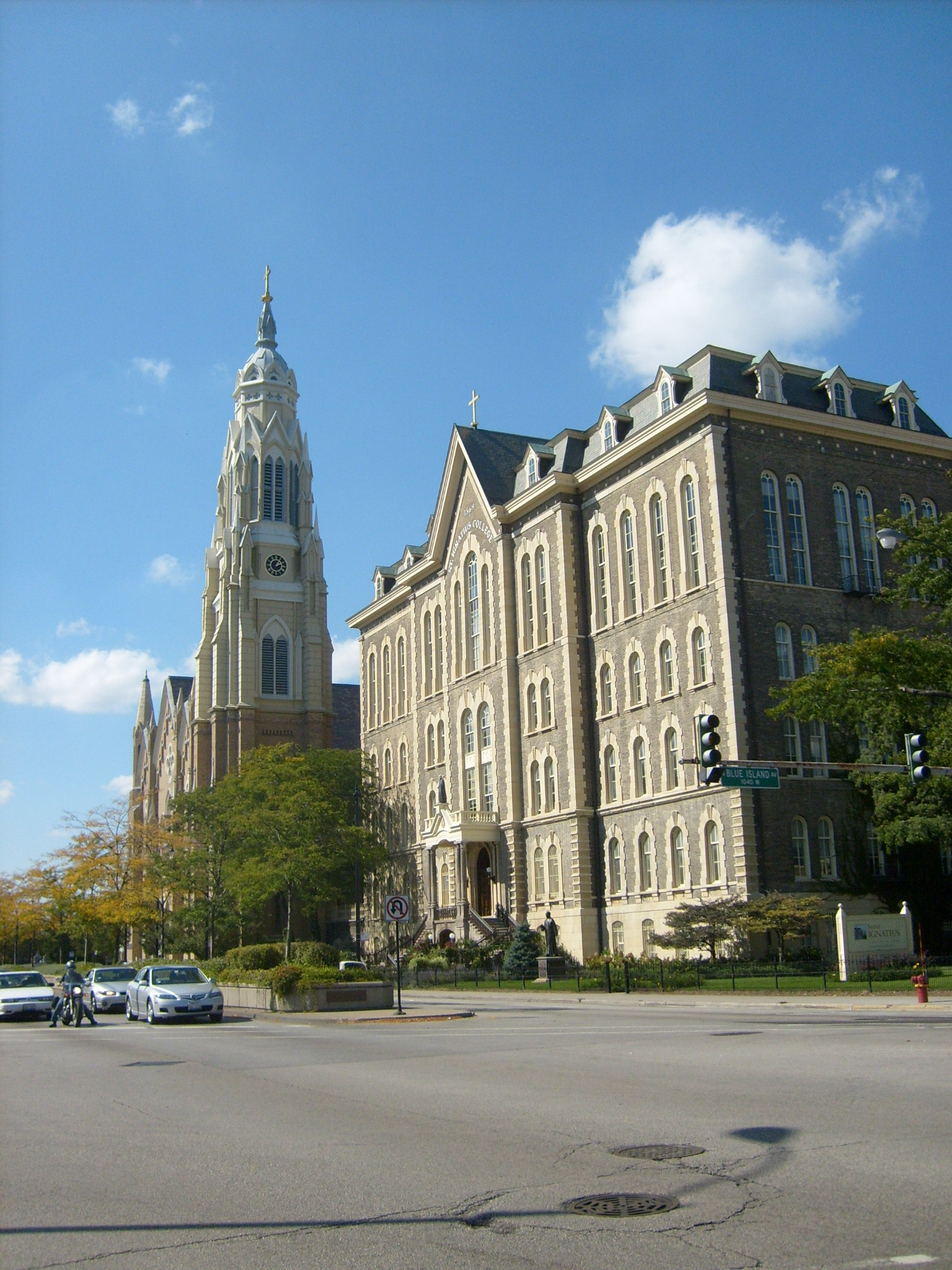 Церковь святого семейства и колледж святого Игнатия в Чикаго